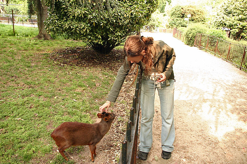 Photo d'un poudou au Jardin des Plantes à Paris. Photo avec une jeune fille pour montrer la taille de l'animal